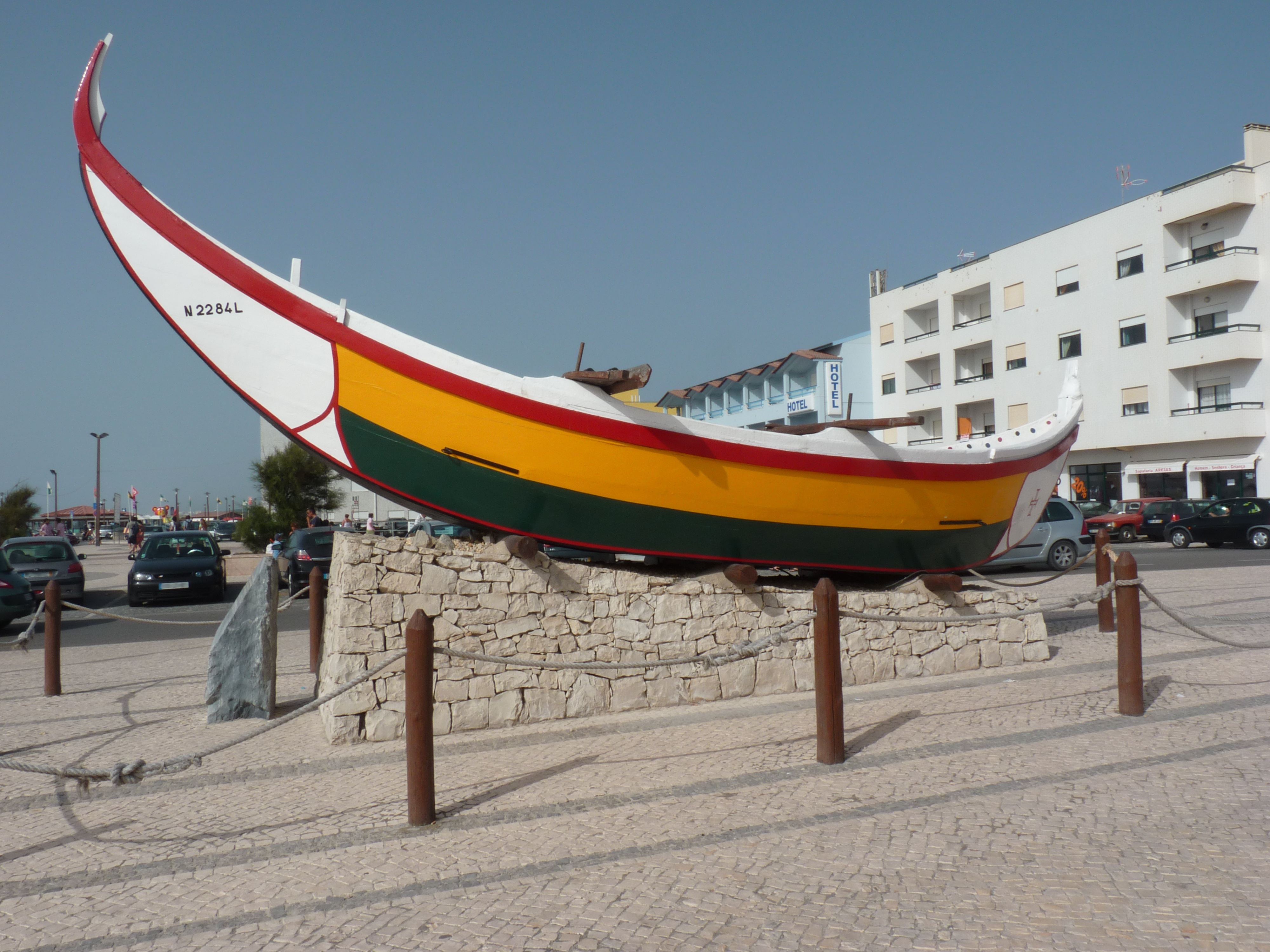 Um barco de pesca na praia da Vieira.